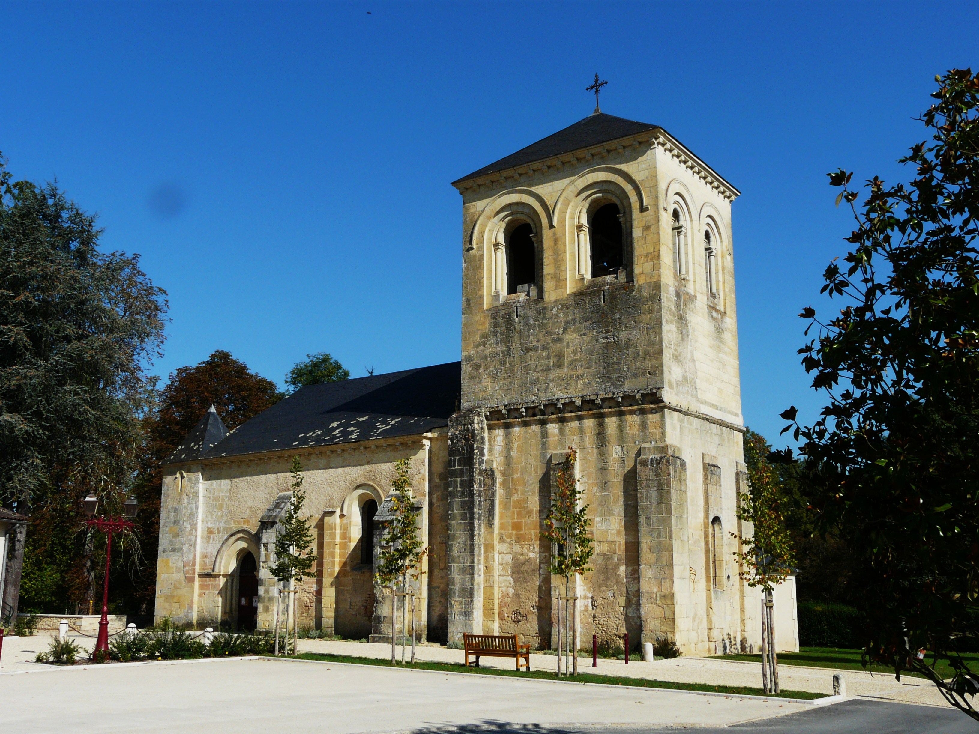 L'église Saint-Laurent, Saint-Laurent-sur-Manoire, Dordogne, France Object location45° 08′ 55.7″ N, 0° 47′ 41.9″ E